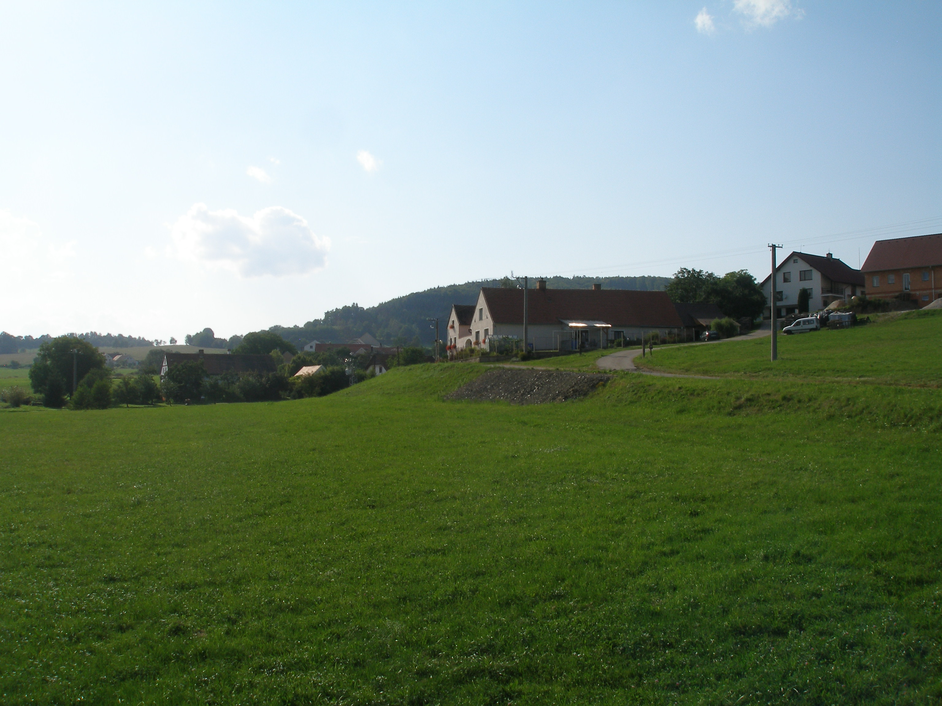 České Chalupy (okres Český Krumlov)